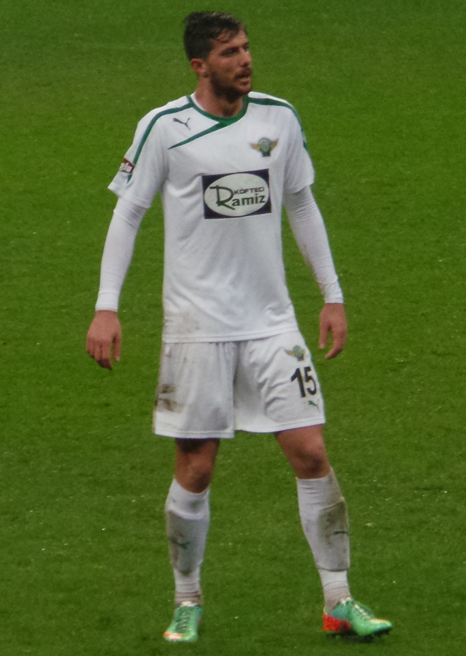 Uğur Demirok